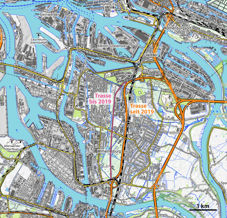 Karte der alten und neuen Trasse der Wilhelmsburger Reichsstraße